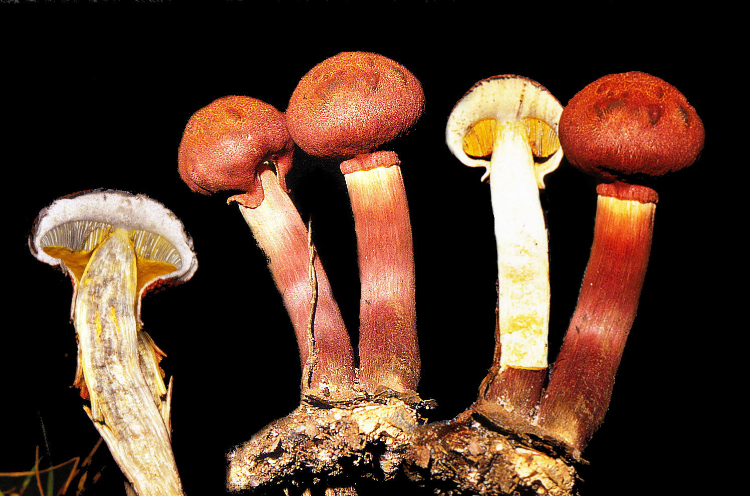 Boletellus emodensis, Bolet hirsute, Bolet chrysanthème (キクバナイグチ) Japon